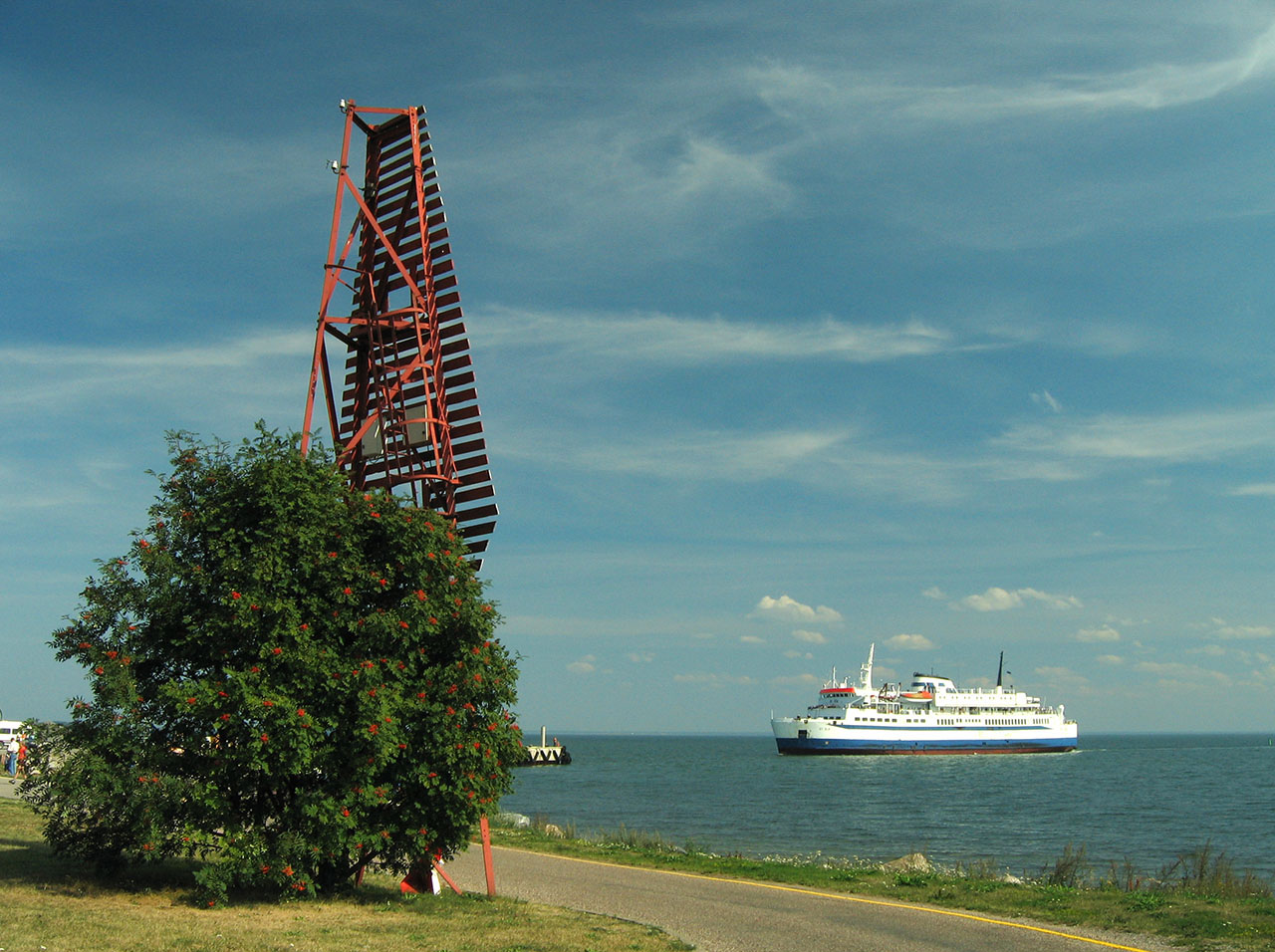 Heltermaa alumine tulepaak